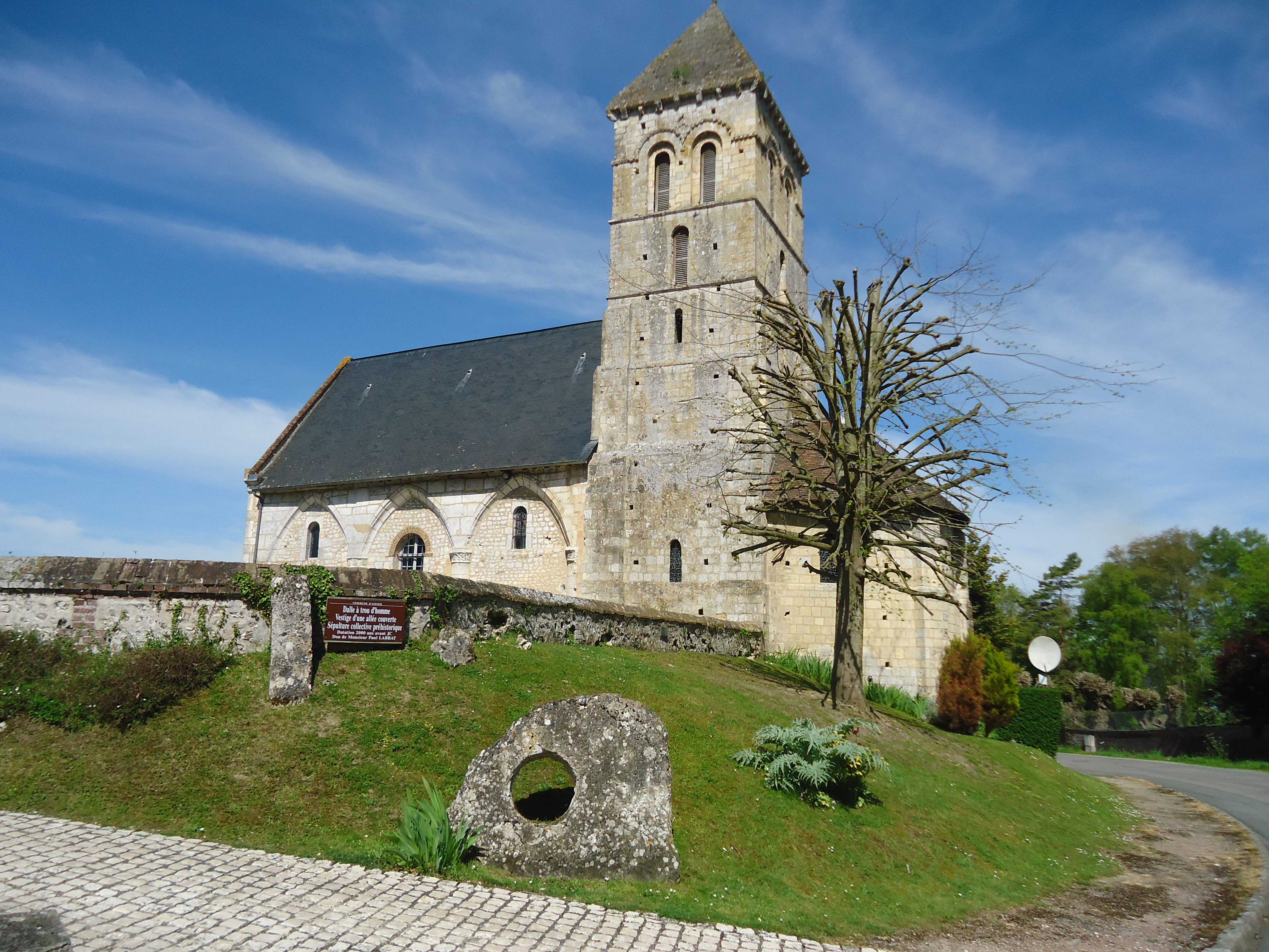 Dalle trouée provenant d'une allée couverte détruite au 19e siècle